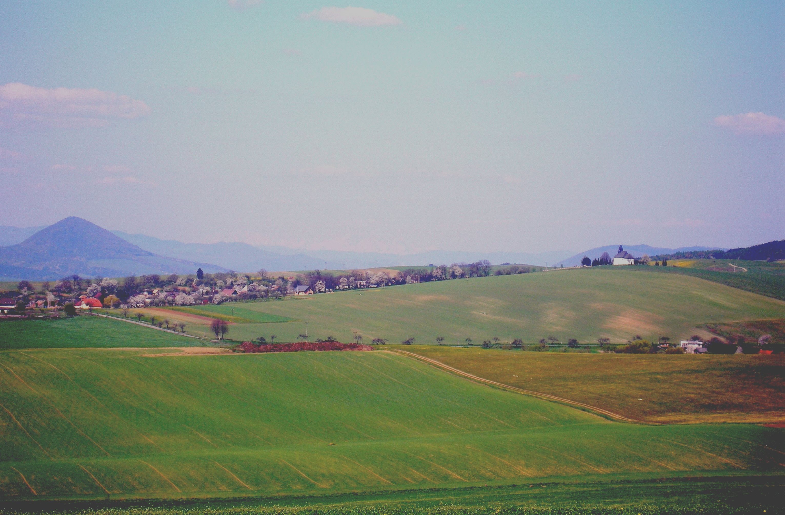 Obec Čelovce okres Prešov región Šariš